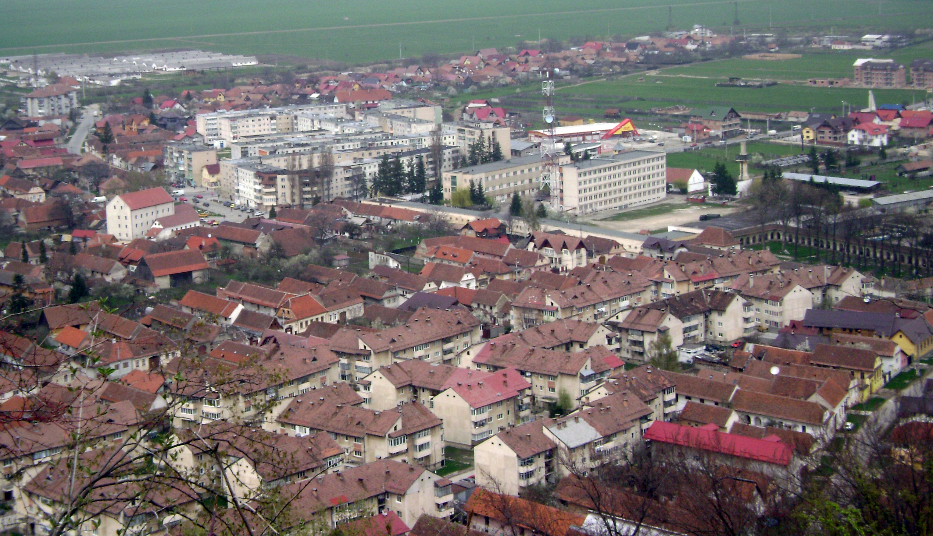 Râşnov, Braşov County, Romania